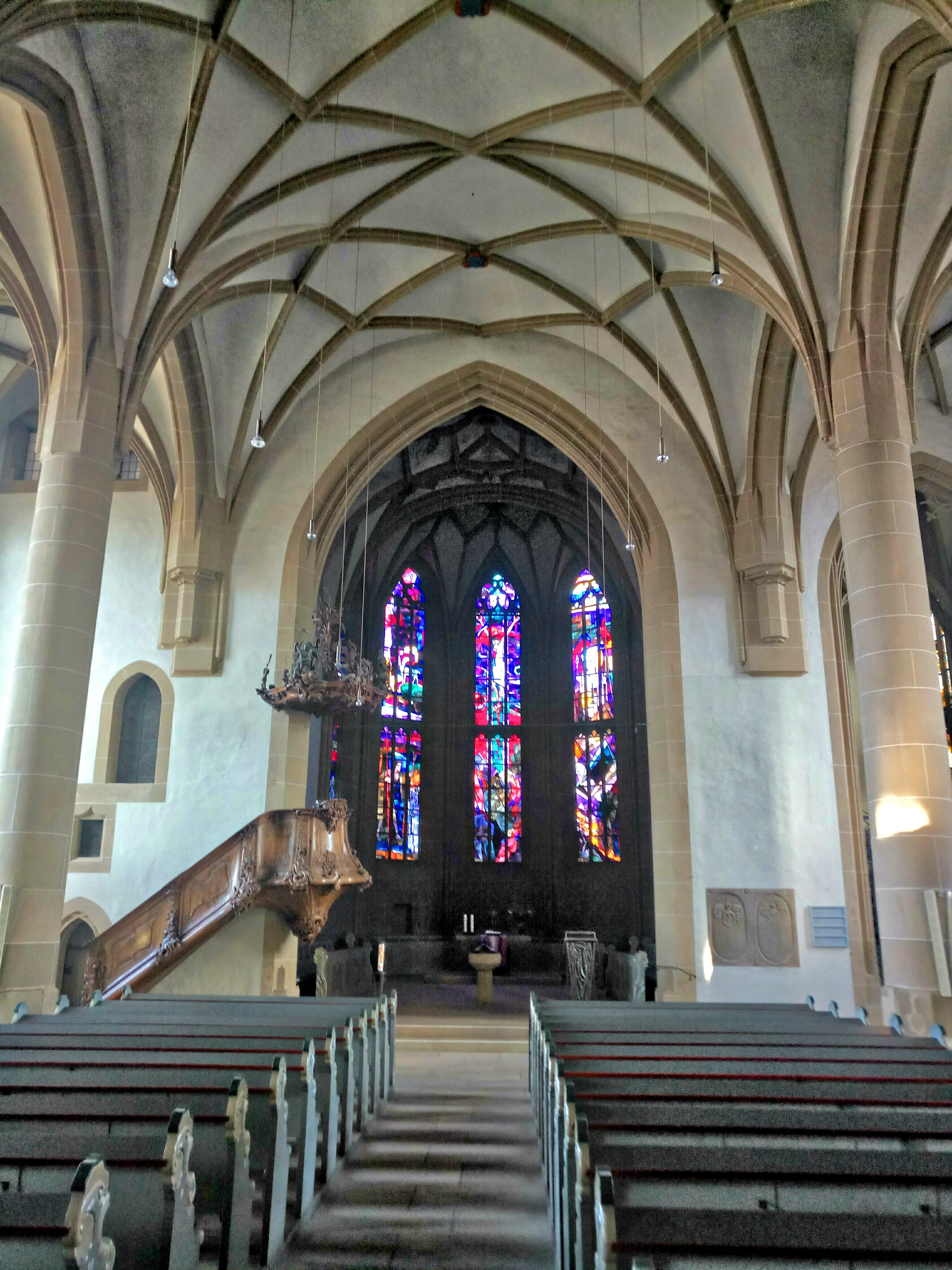 Schlosskirche Meisenheim innen